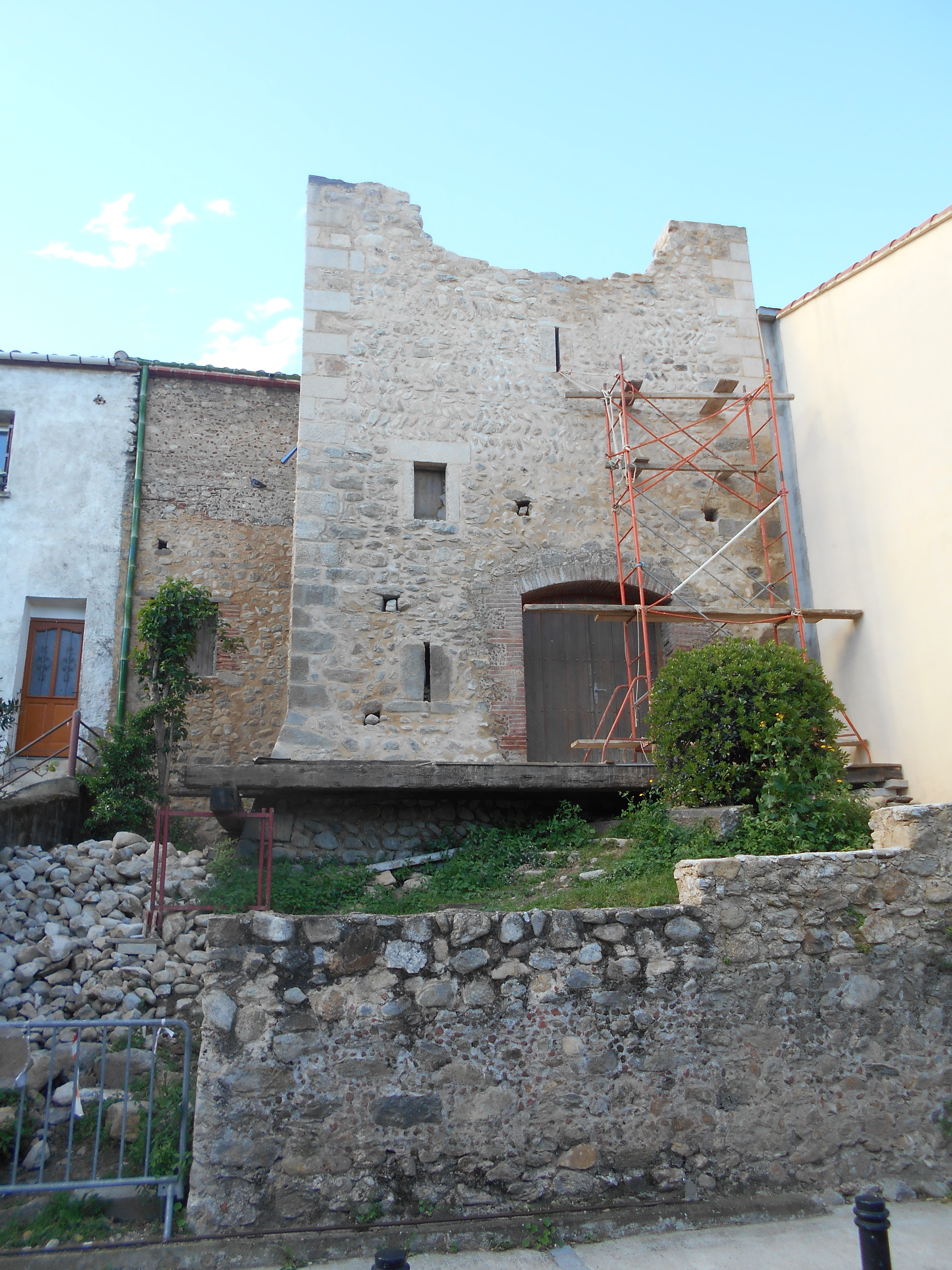 Muralles de la vila d'Argelers de la Marenda.